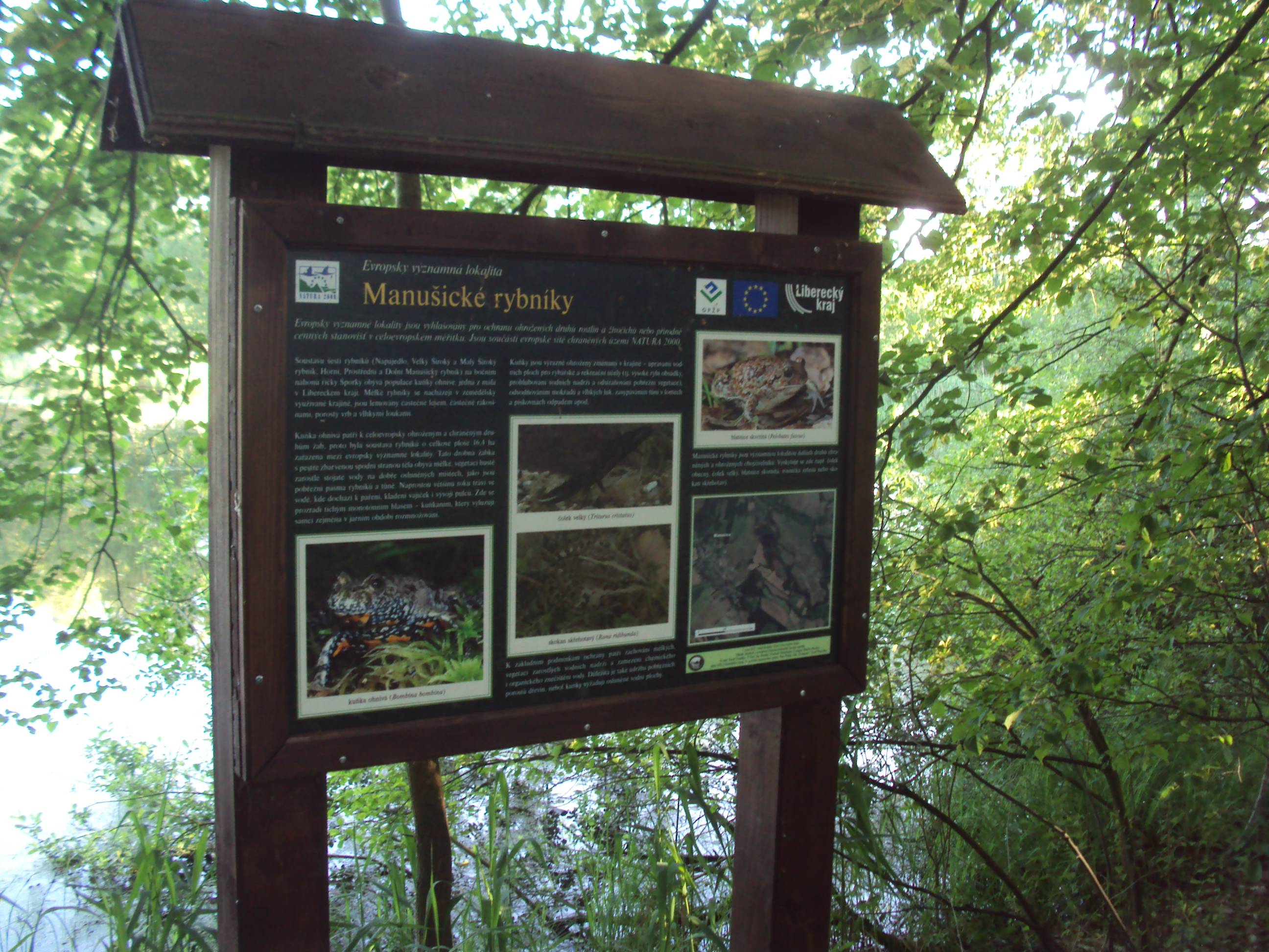 Česky: Infotabule PP Manušické rybníky u cesty mezi Malým a Velkým Širokým rybníkem